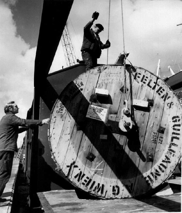 alte Kabeltrommel bei der Verladung